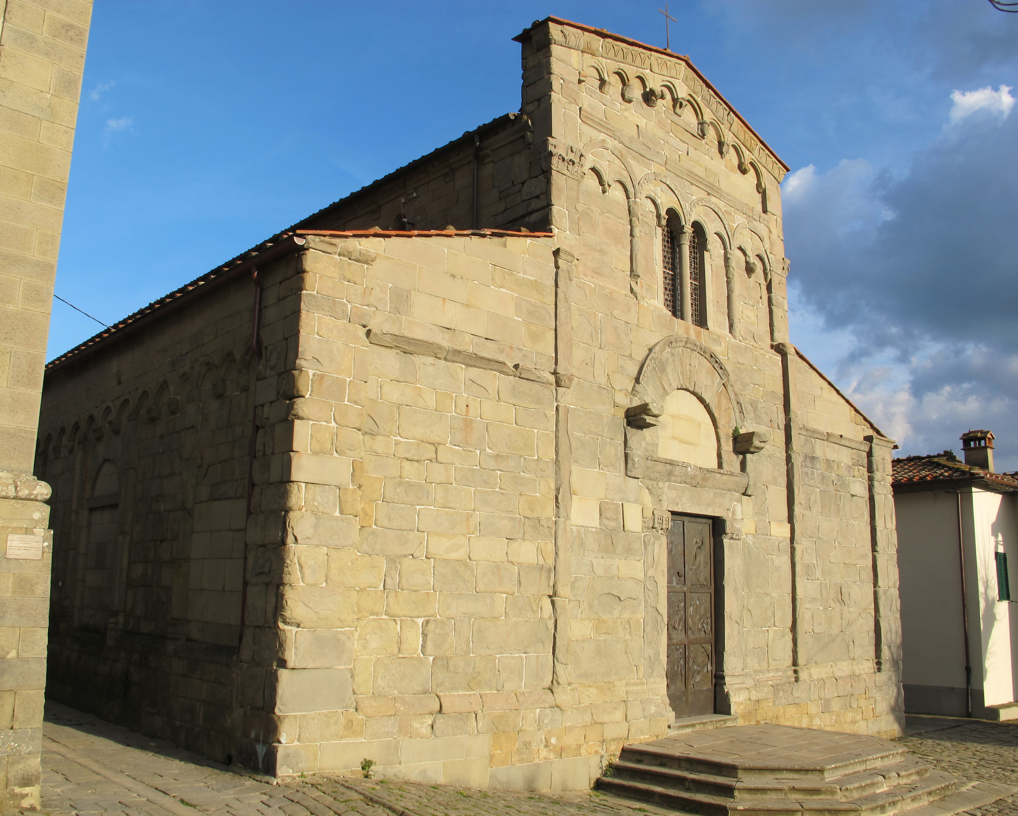 Pieve di san gennaro